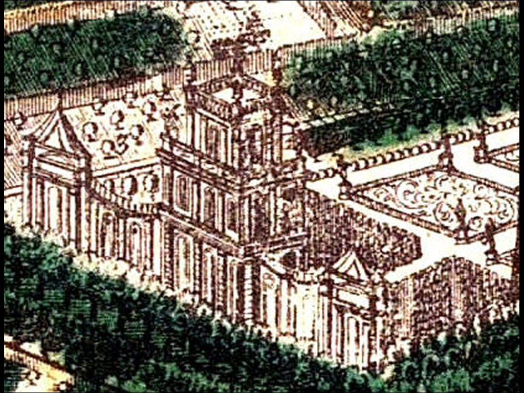 Monument um 1730